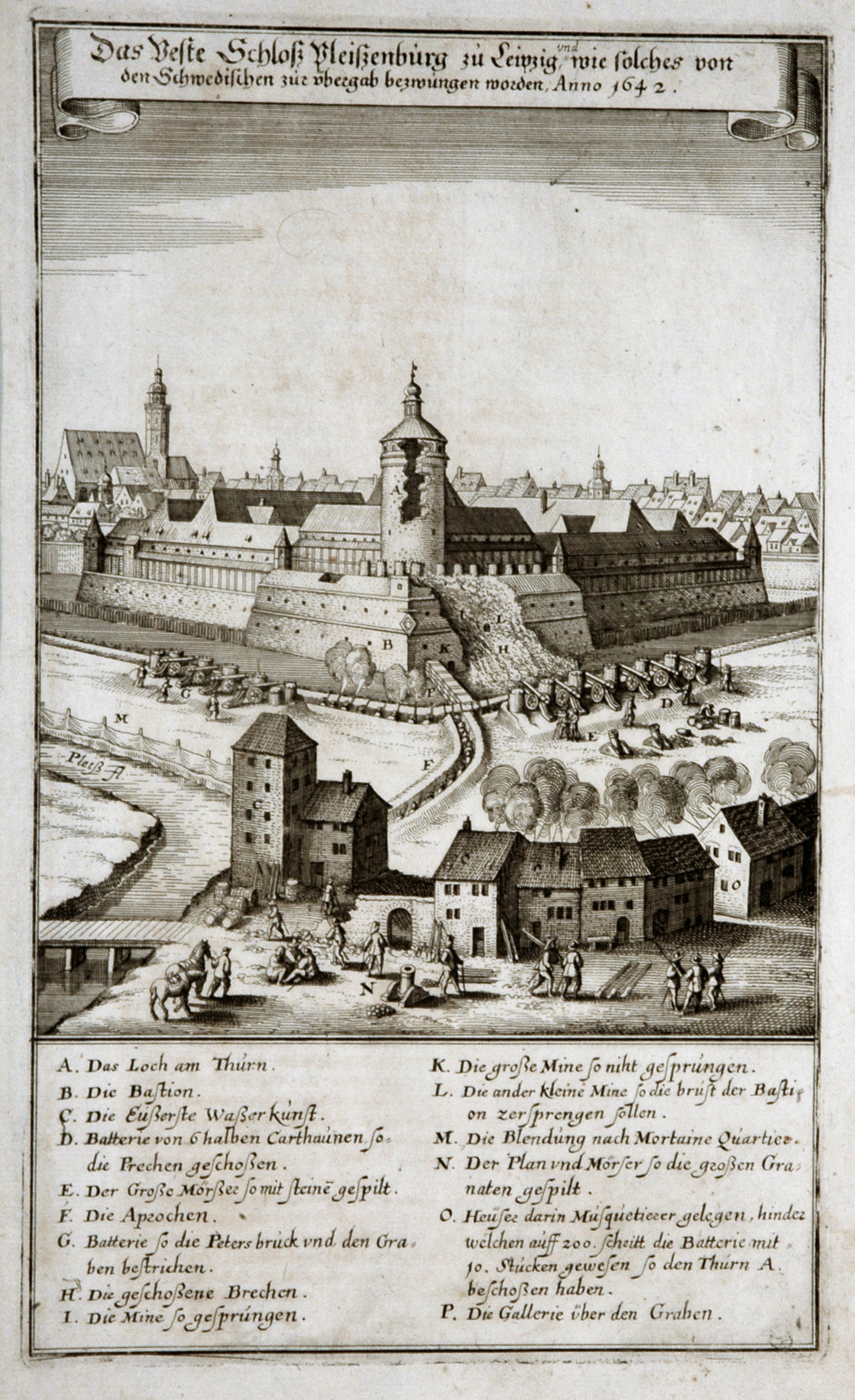 "Das Veste Schloß Pleißenburg zu Leipzig, und wie solches von den Schwedischen zur übergab bezwungen worden, Anno 1642. Kupferstich aus THEATRUM EUROPAEUM (1643), 28,4 x 17,1 cm Plattenrand. Darstellung minimal altersgebräunt, Altersflecken außerhalb der Darstellung. Literatur: Wustmann, Gustav: Bilderbuch aus der Geschichte der Stadt Leipzig. Leipzig: H. Zieger 1897, Seite 32.